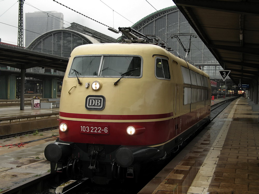 103 222 im strömenden Regen im Frankfurt Hbf